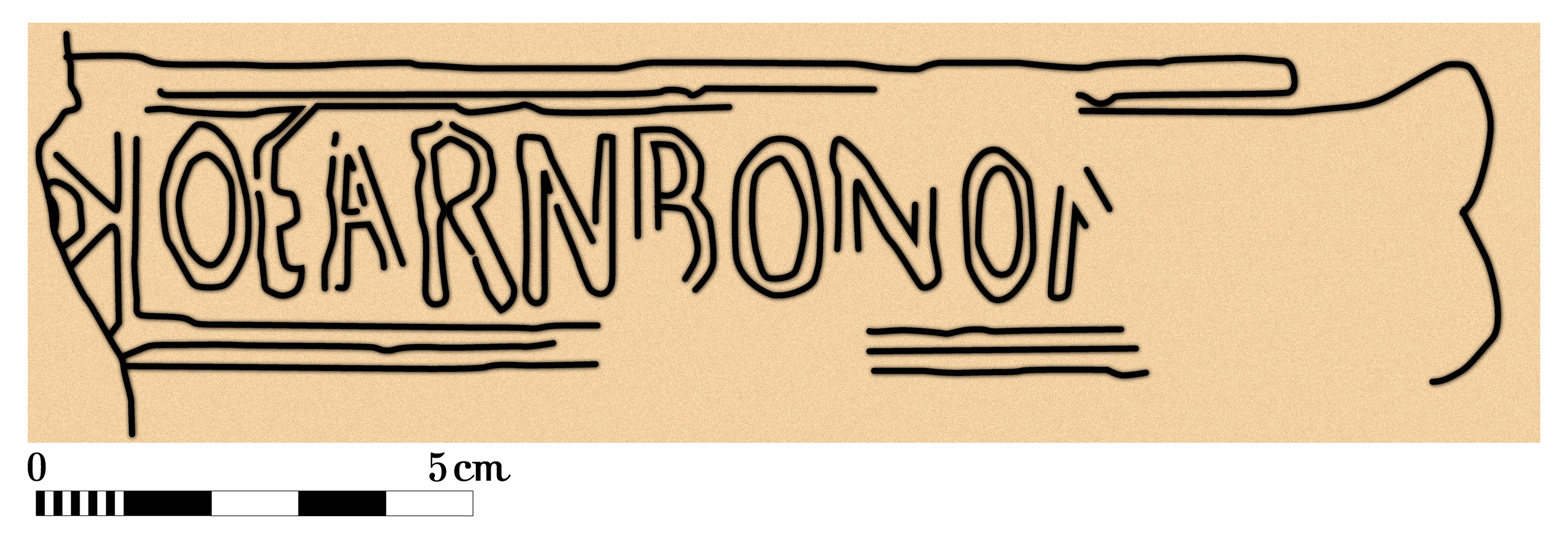 Ziegelstempel OFARNBONOMAG (sesquipedalis later) vom Gelände des ungarischen Kastells Göd-Bócsaújtelep. Fundstelle: Graben 9 der Ausgrabung 2000–2001, aus der die Innenflucht der Festungsmauer markierenden Ziegelreihe. Zeichnung nach einer Darstellung in: Zsolt Mráv: Archäologische Forschungen 2000–2001 im Gebiet der spätrömischen Festung von Göd-Bócsaújtelep (Vorbericht) 2002. In: Communicationes archeologicae Hungariae 2003. Népművelési Propaganda Iroda. Budapest 2003. S. 103.